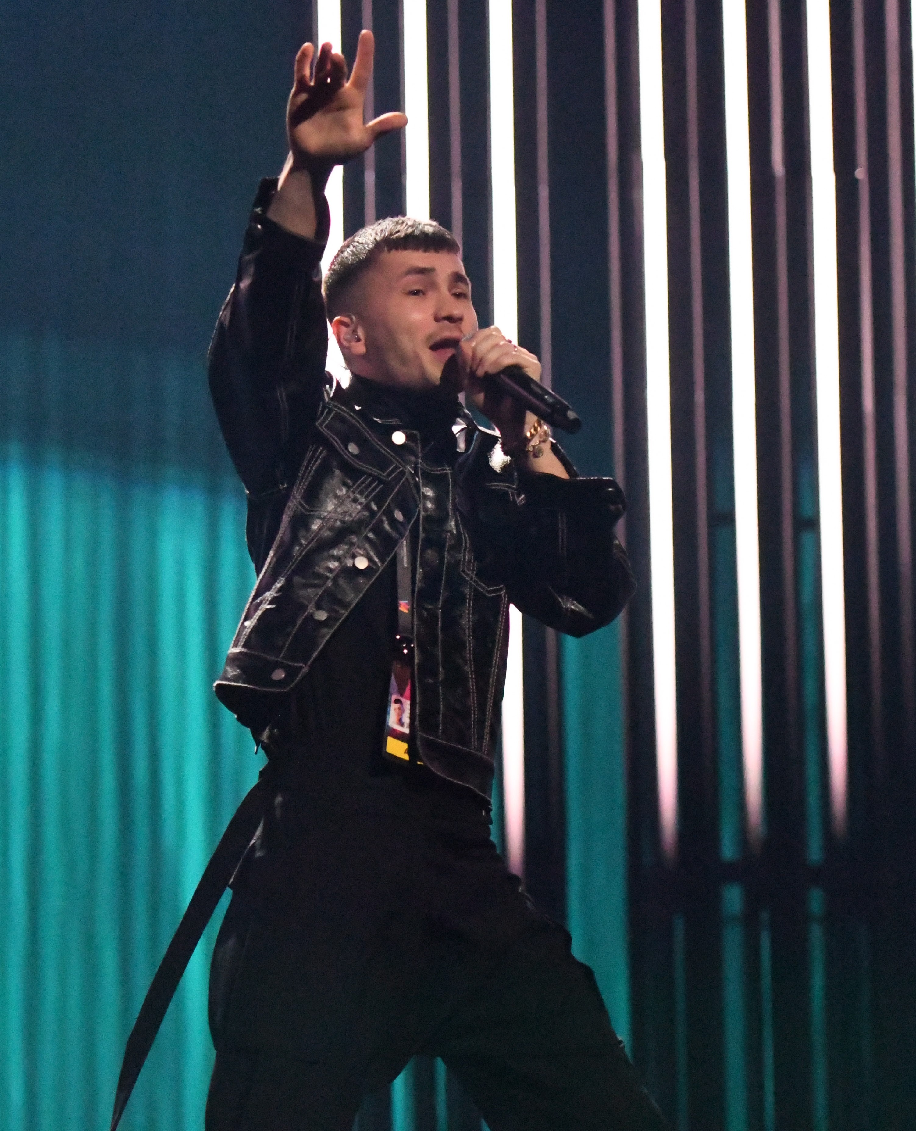 Melodifestivalen 2020, Deltävling 2, Göteborg, Paul Rey